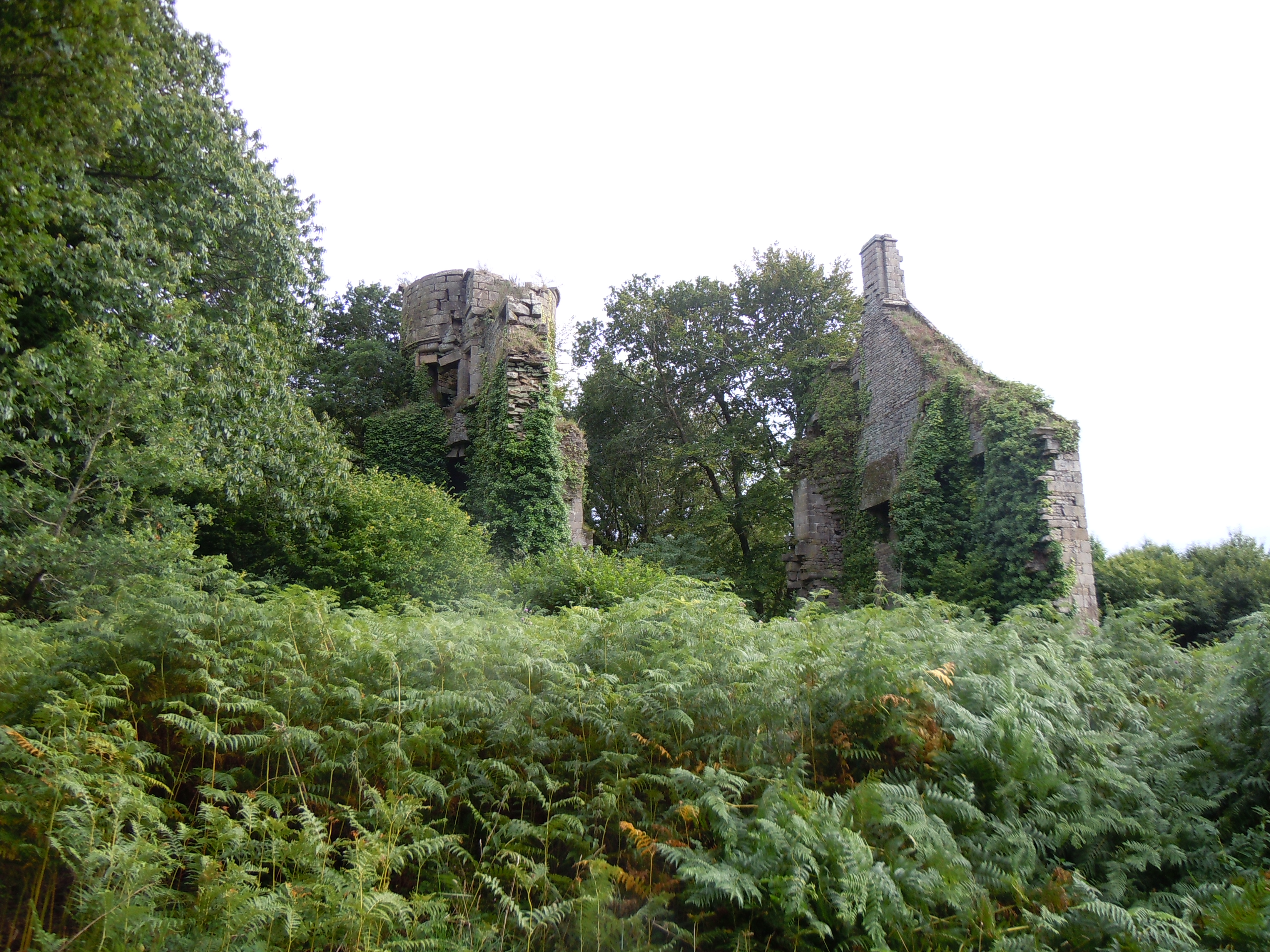 ruines de l'ancien château de Rustéphan, commune de Pont-Aven, département du Finistère, France